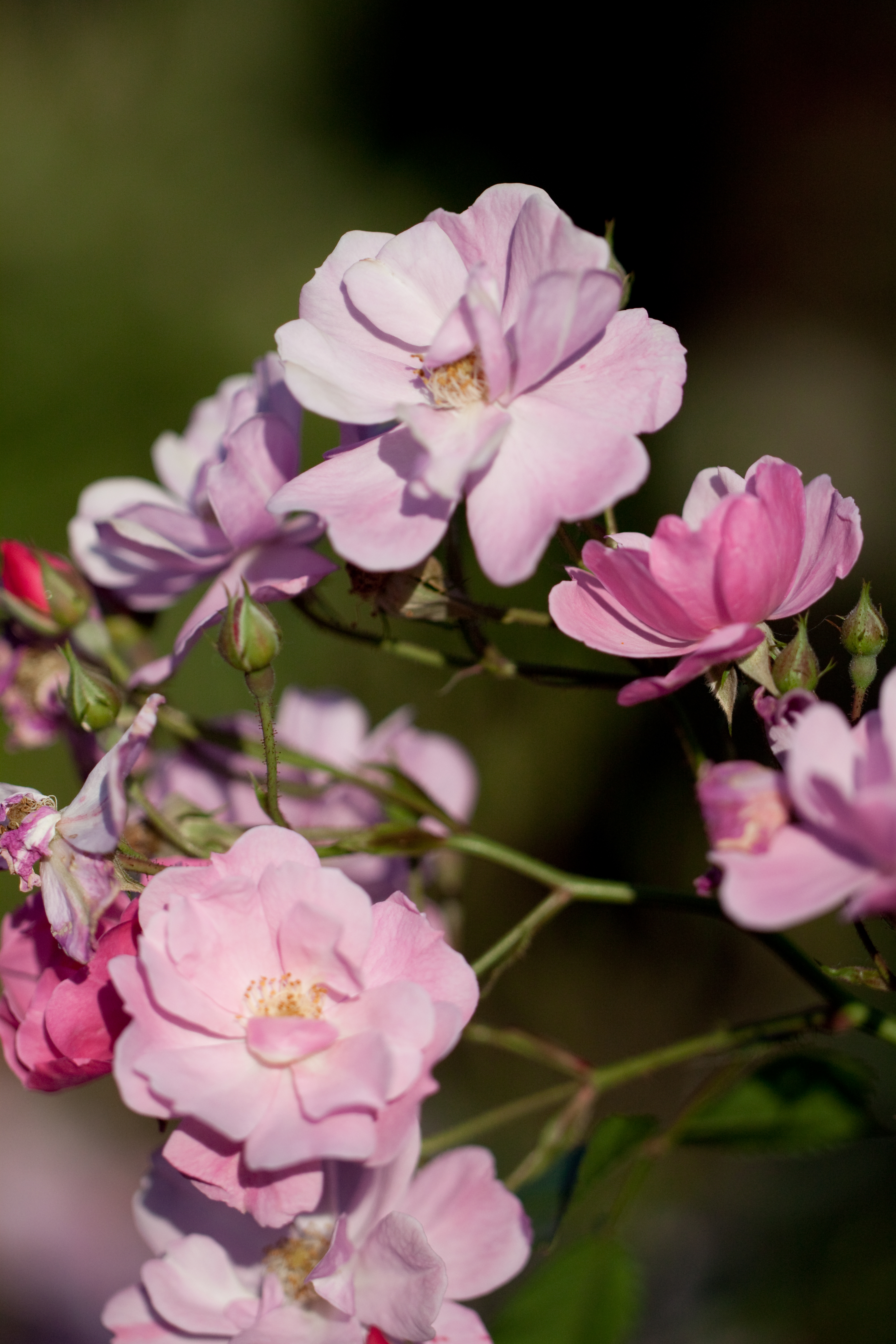 Lavender Dream. ã©ãã³ãã¼ã»ããªã¼ã